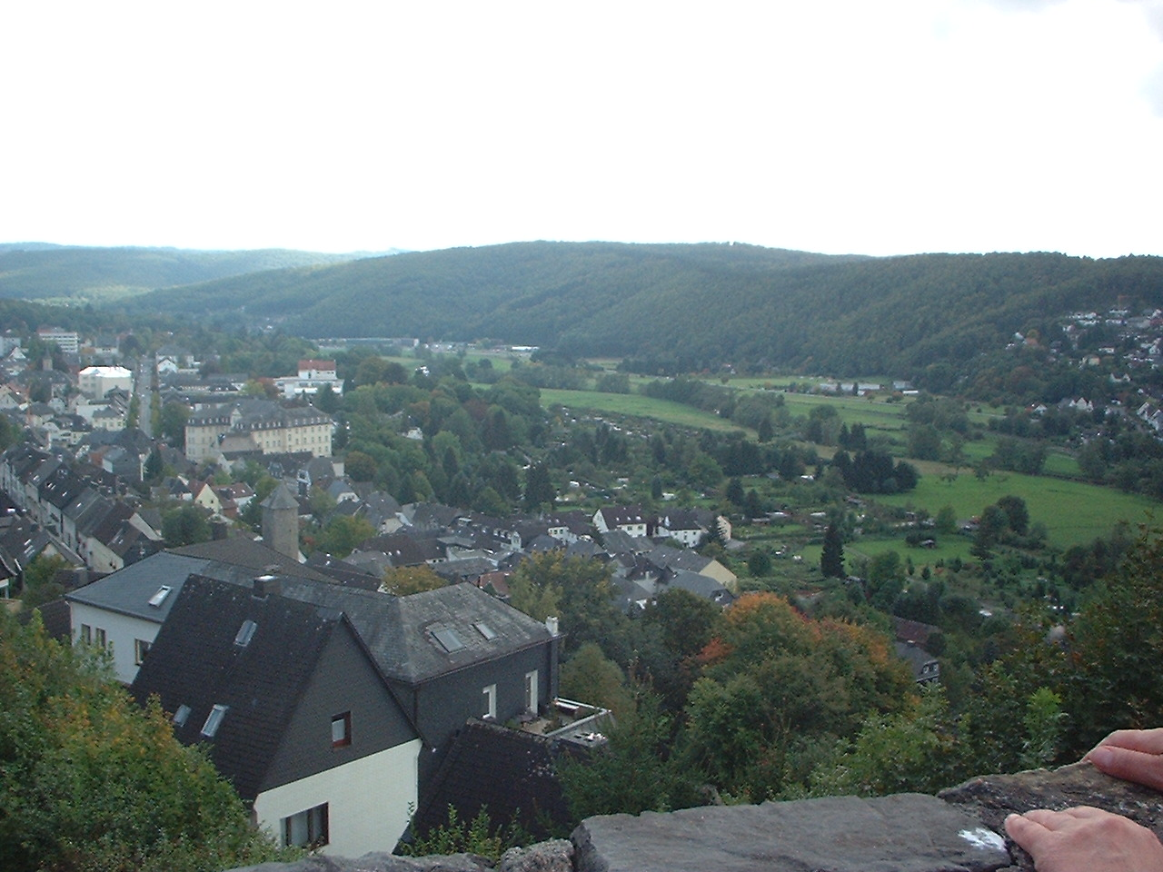 View over Arnsberg